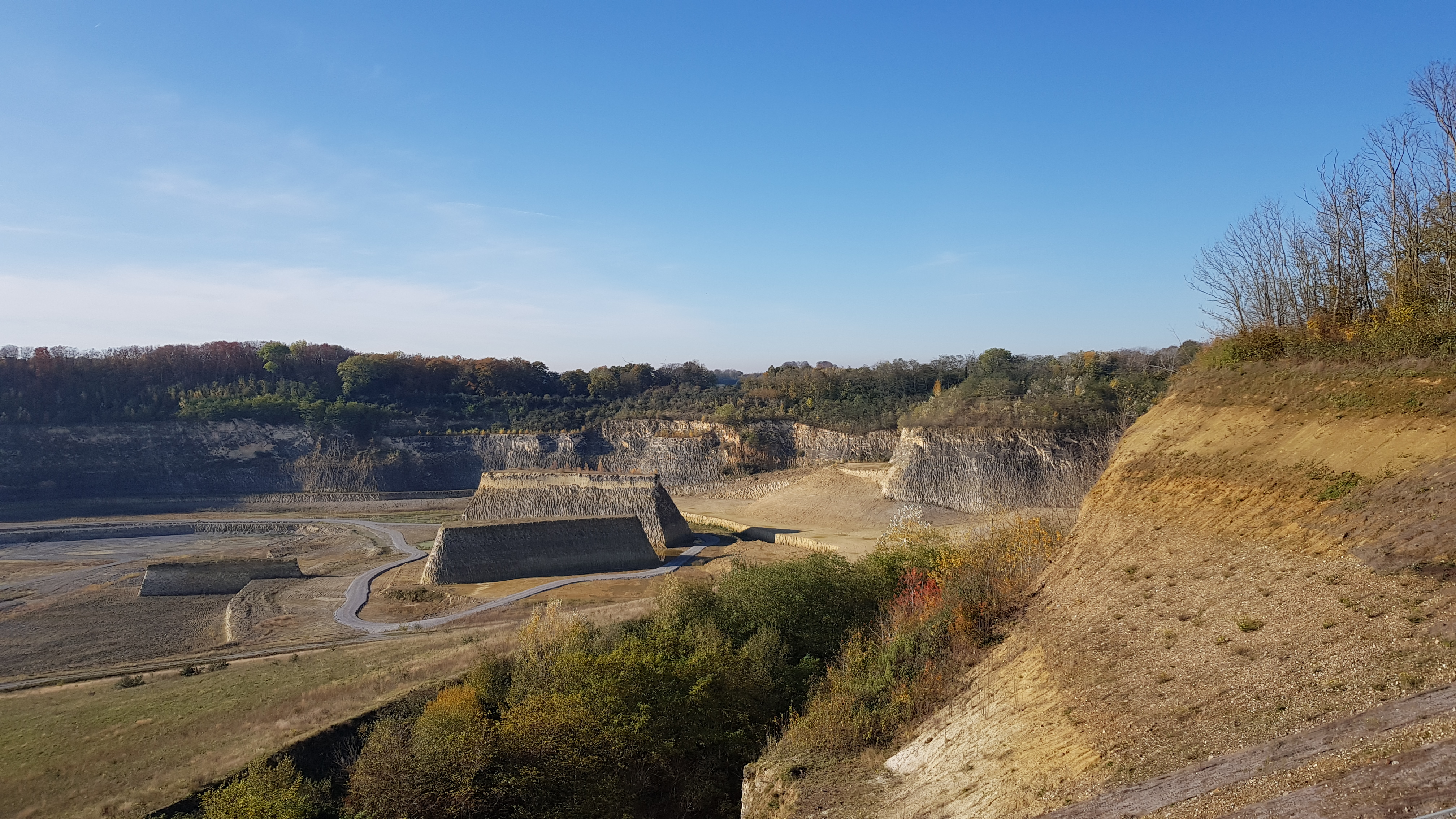 Oehoevallei op de Sint-Pietersberg, Maastricht, Nederland